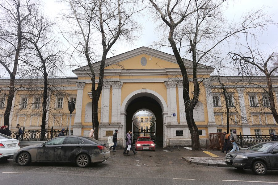 Главные ворота Лефортовского дворца